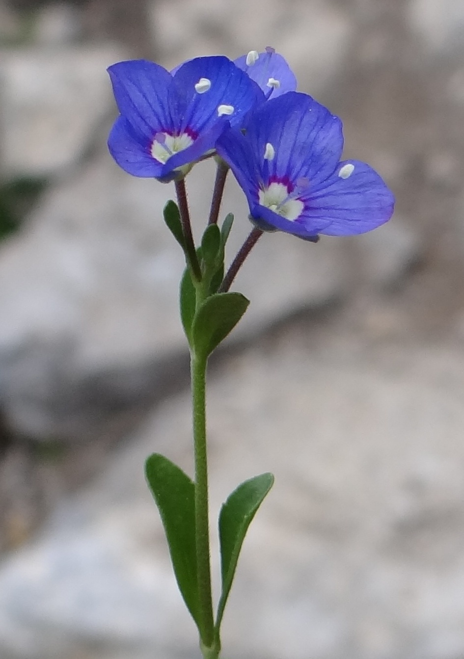 Veronica fruticans (habitat:West Tatra Mountains)